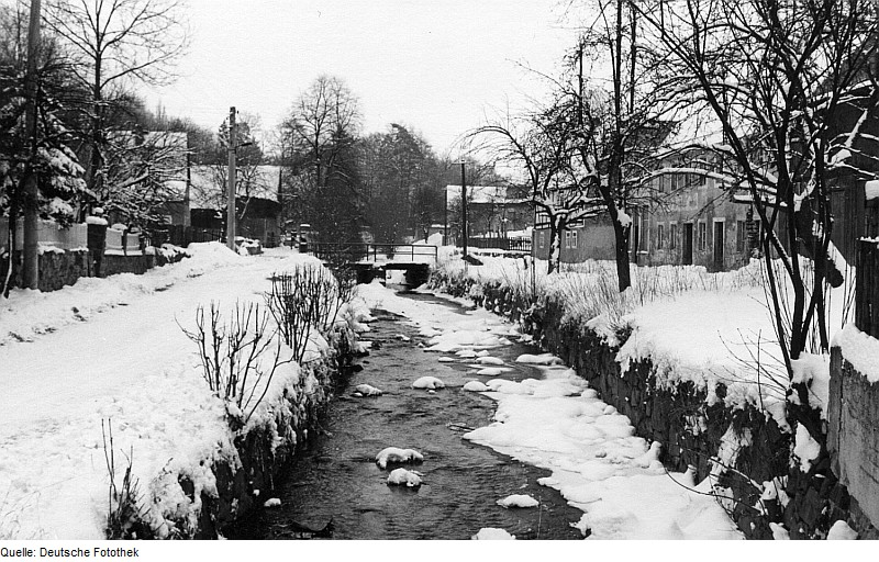 Original image description from the Deutsche FotothekTriebischtal-Taubenheim. Kleine Triebisch zwischen Ober- und Niedermühle